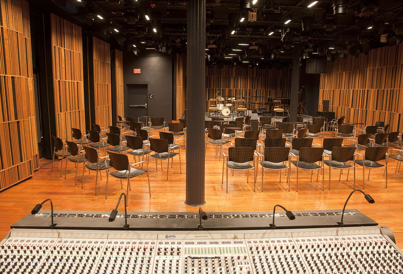 20111102_MG_9929 (1)